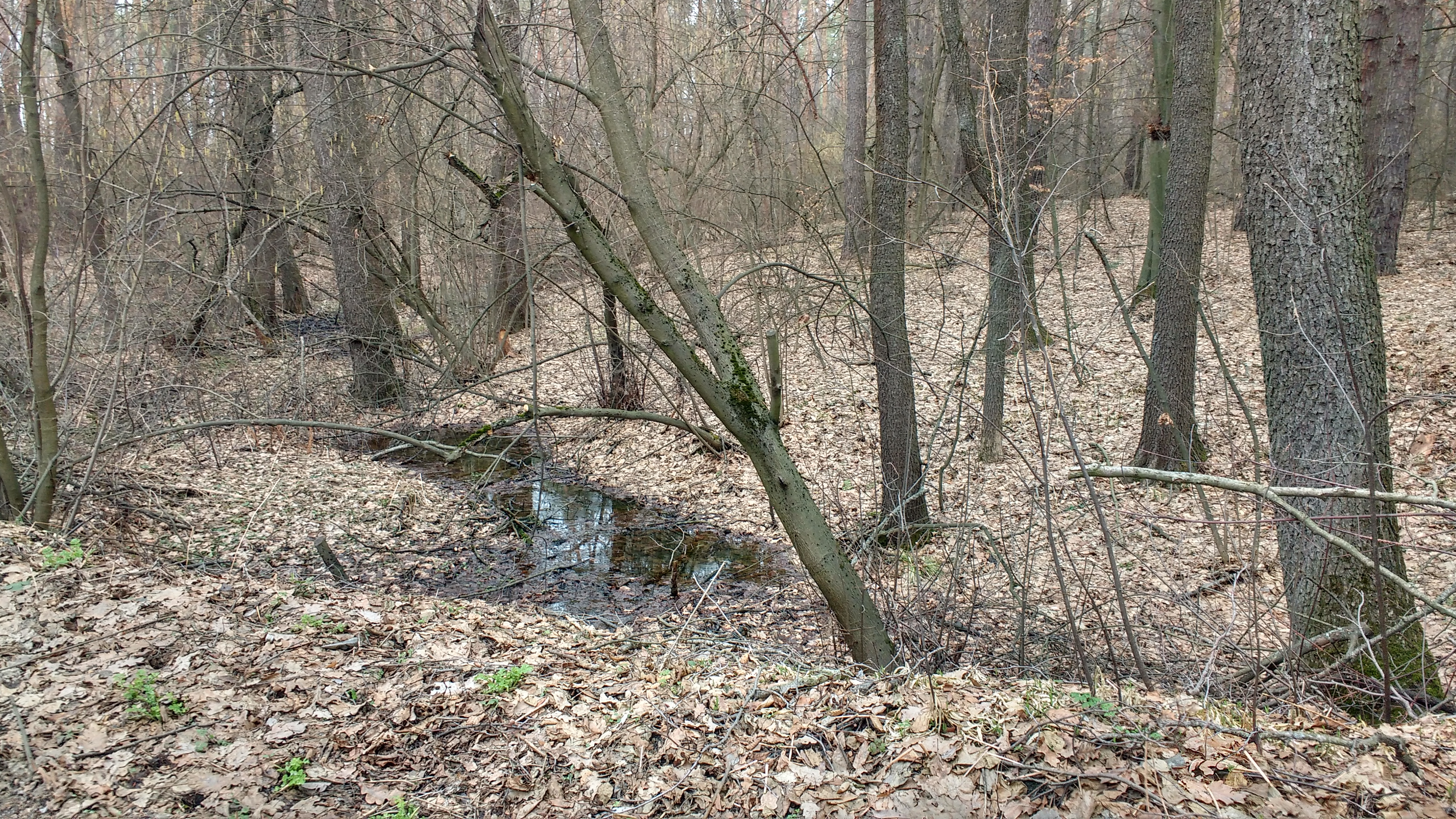 Рання весна в урочищі "Пужа"